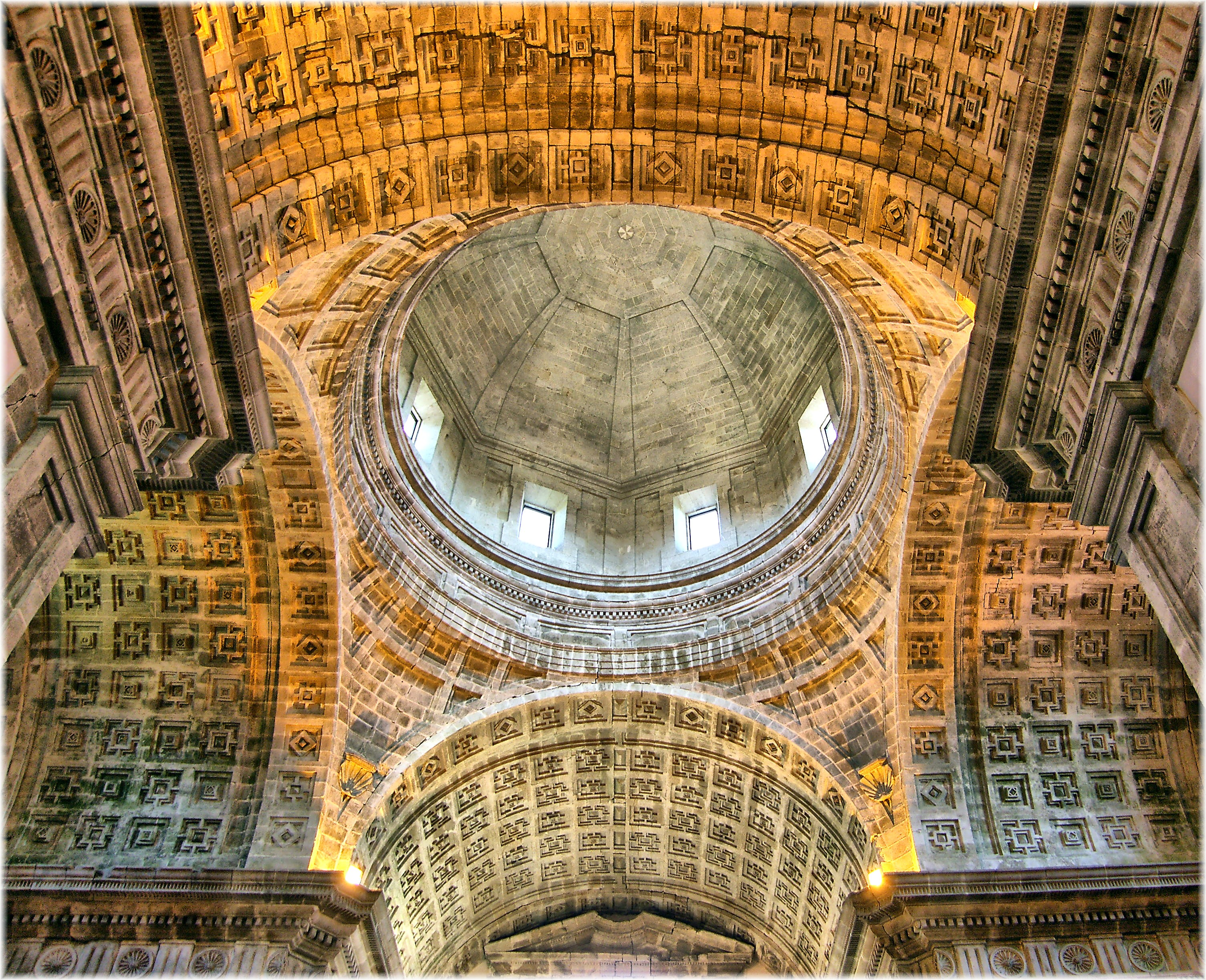 Mosteiro de Santa María de Monfero